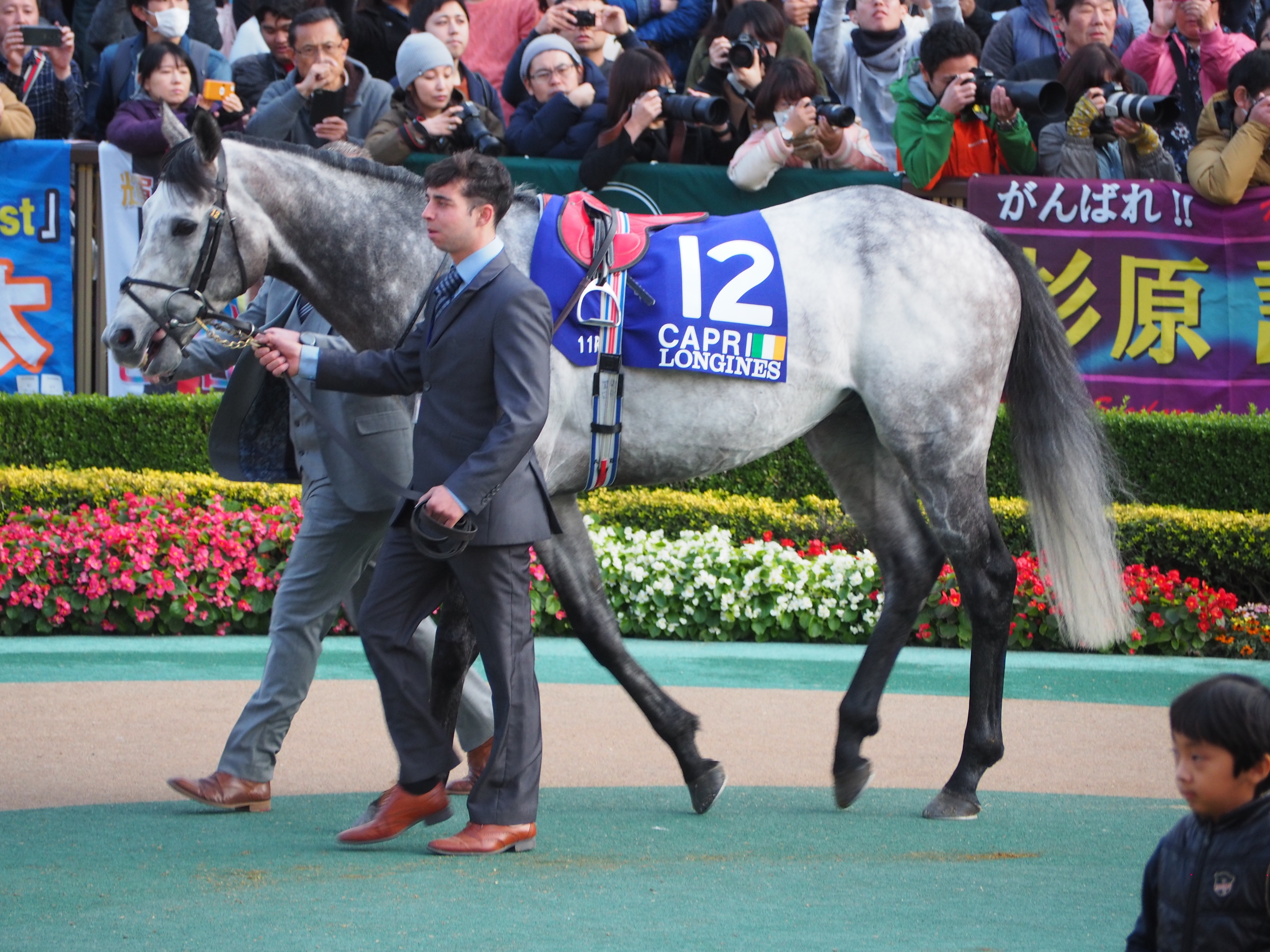 カプリ ジャパンカップ パドック